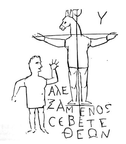 Deliniado del grafito de Alexameno